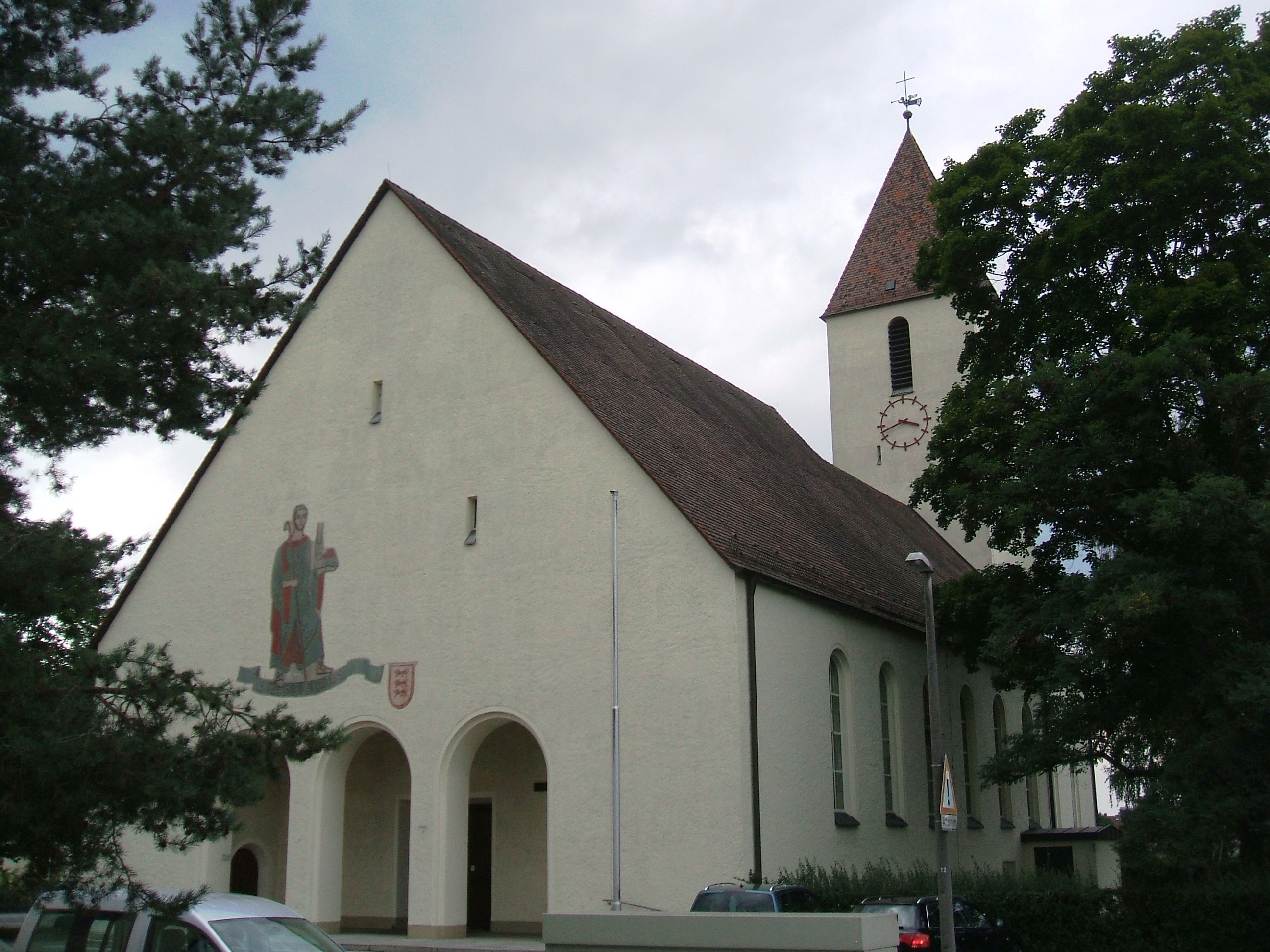 Katholische Pfarrkirche St. Sebald Nürnberg-Altenfurt